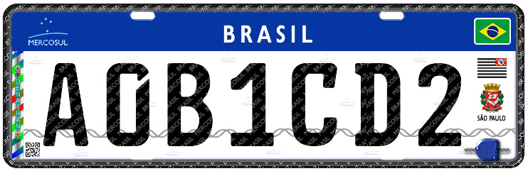 Placa de passeio versão Brasil, em vigor a partir de 1º-1-2016.